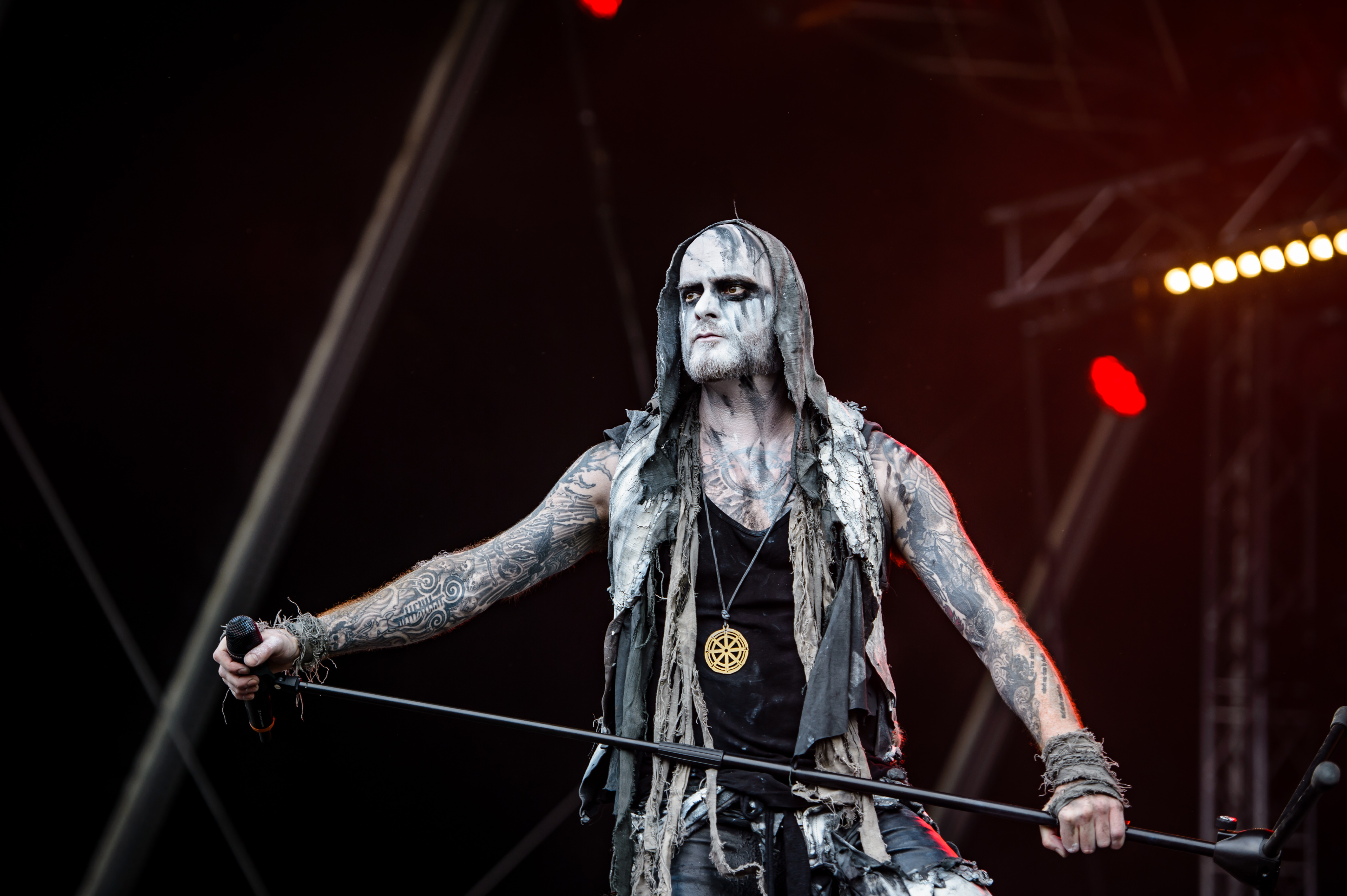 'RockHarz Open Air 2016; Ballenstedt': 'Primordial'